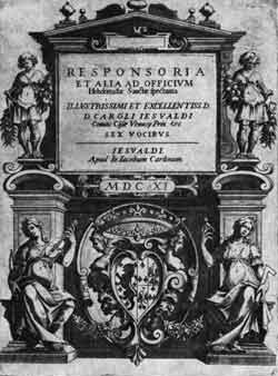 Gesualdo - Tenebrae Responsoria Frontispice